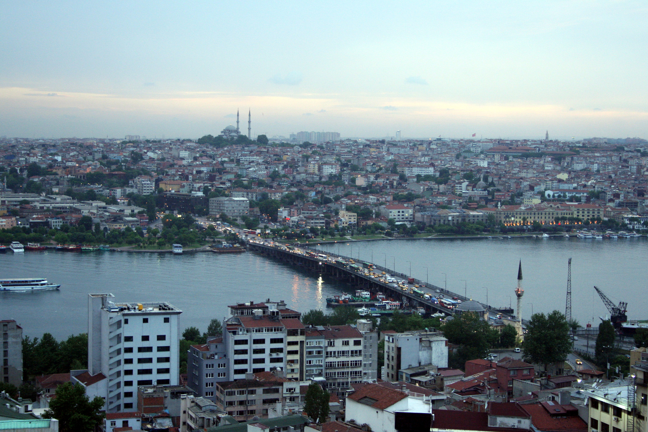 Le pont Unkapan à Istamboul